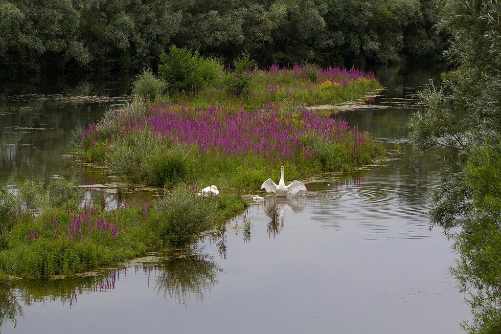 Blick nach Nordost an der 1. Beobachtungskanzel im Naturschutzgebiet Bislicher Insel in NRW, Deutschland